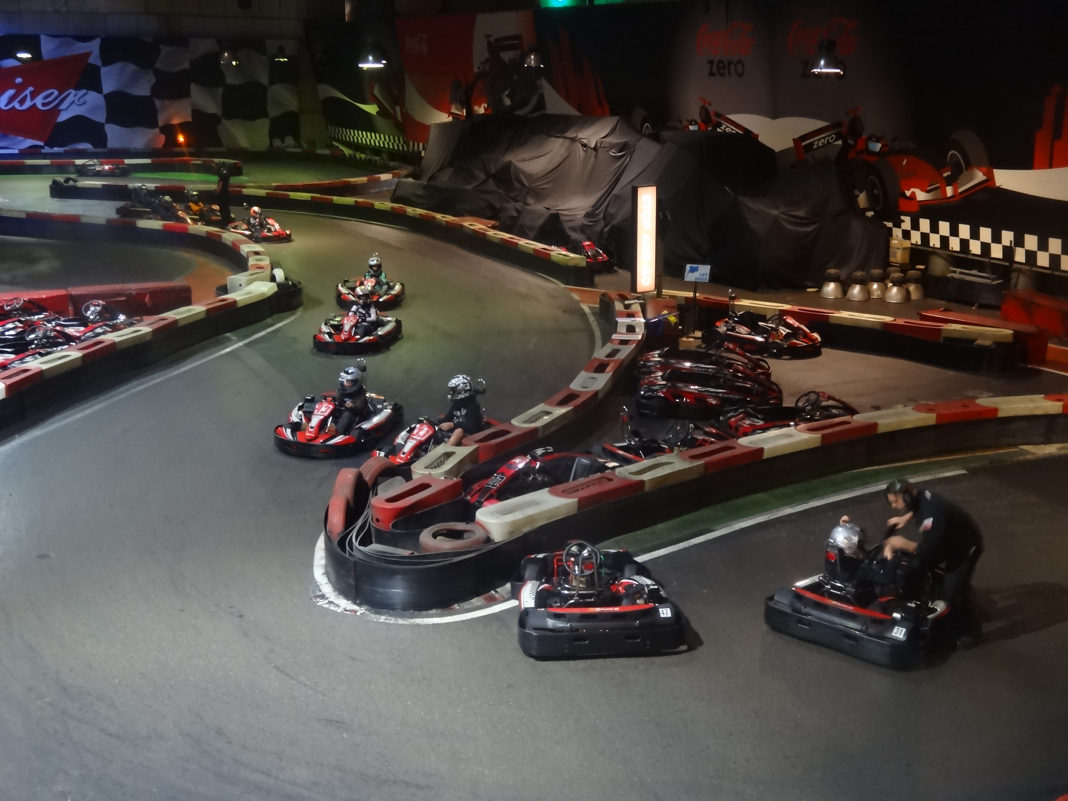 Indoor Karting Barcelona (Sant Feliu de Llobregat)